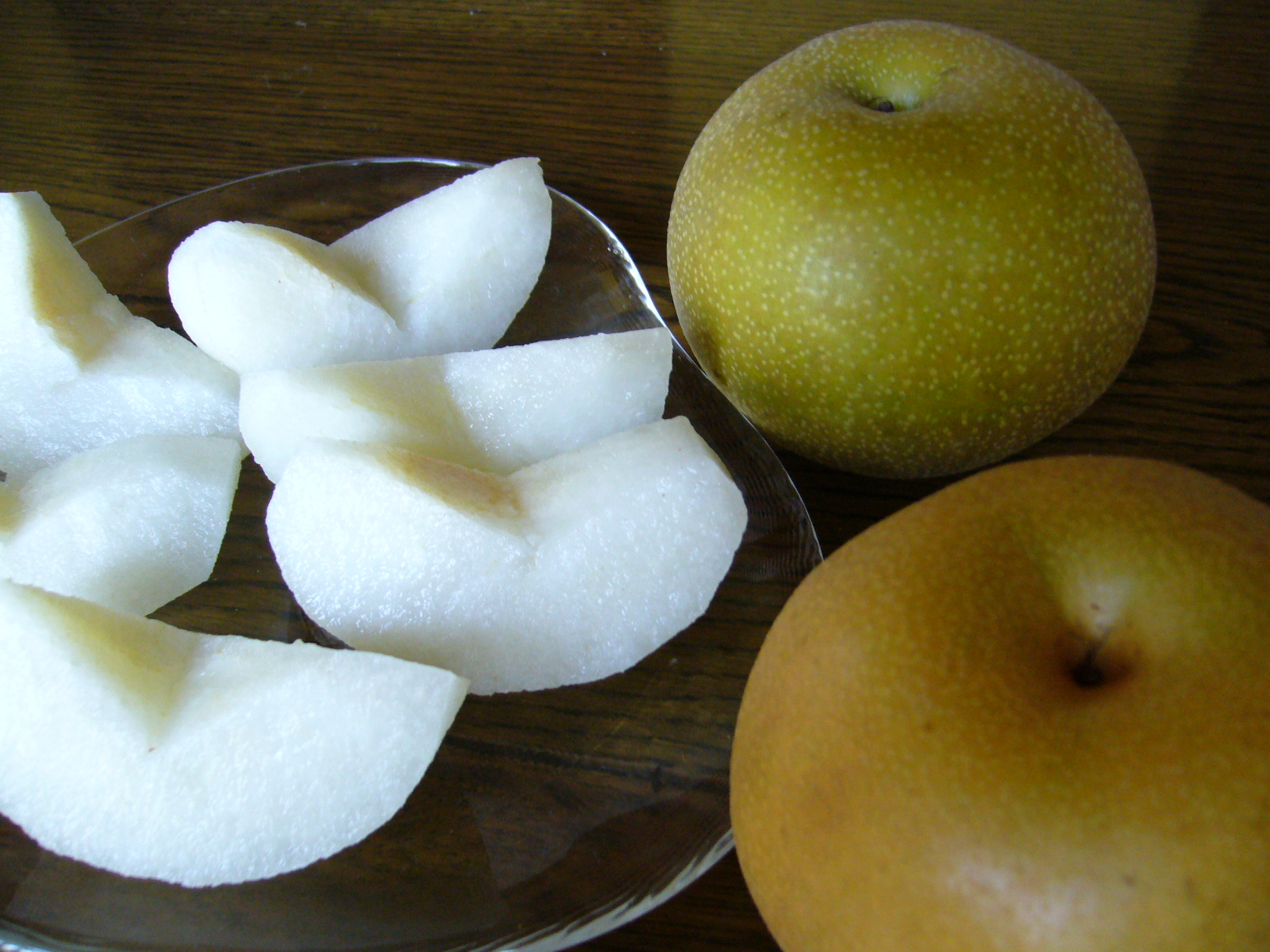 Nashi-pear-hosui,katori-city,japan